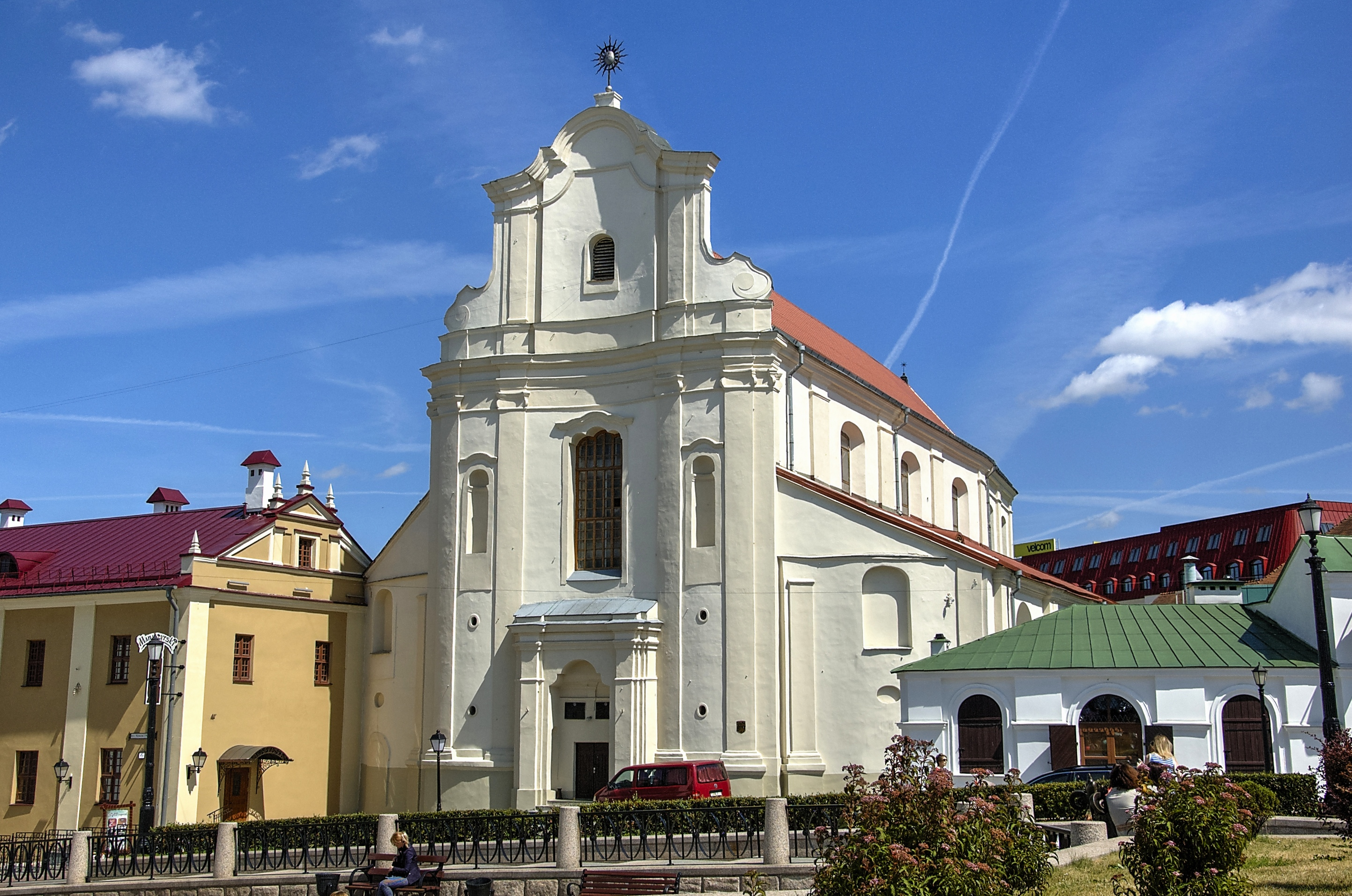 Беларуская (тарашкевіца): Касьцёл Сьвятога Язэпа, Менск